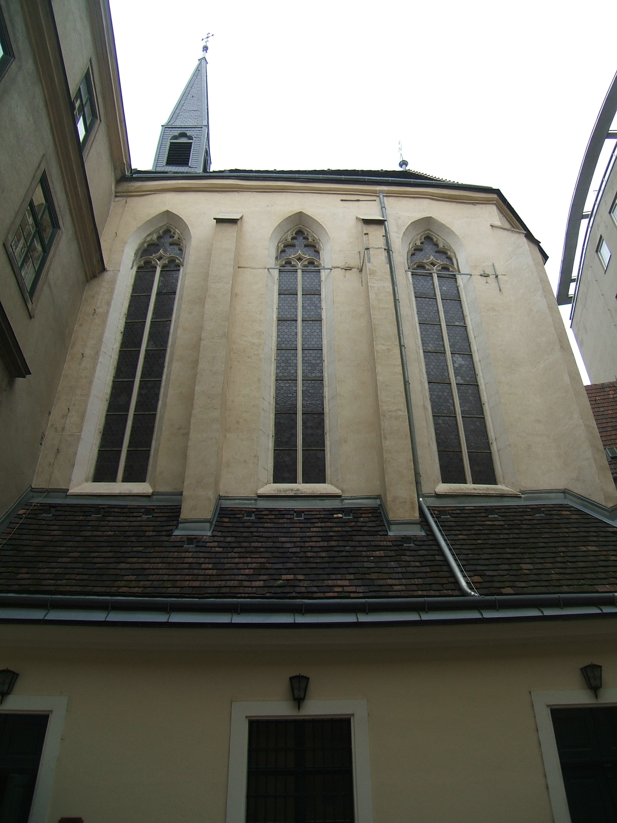 Salvatorkapelle, altkath. Kirche Wien-Innen